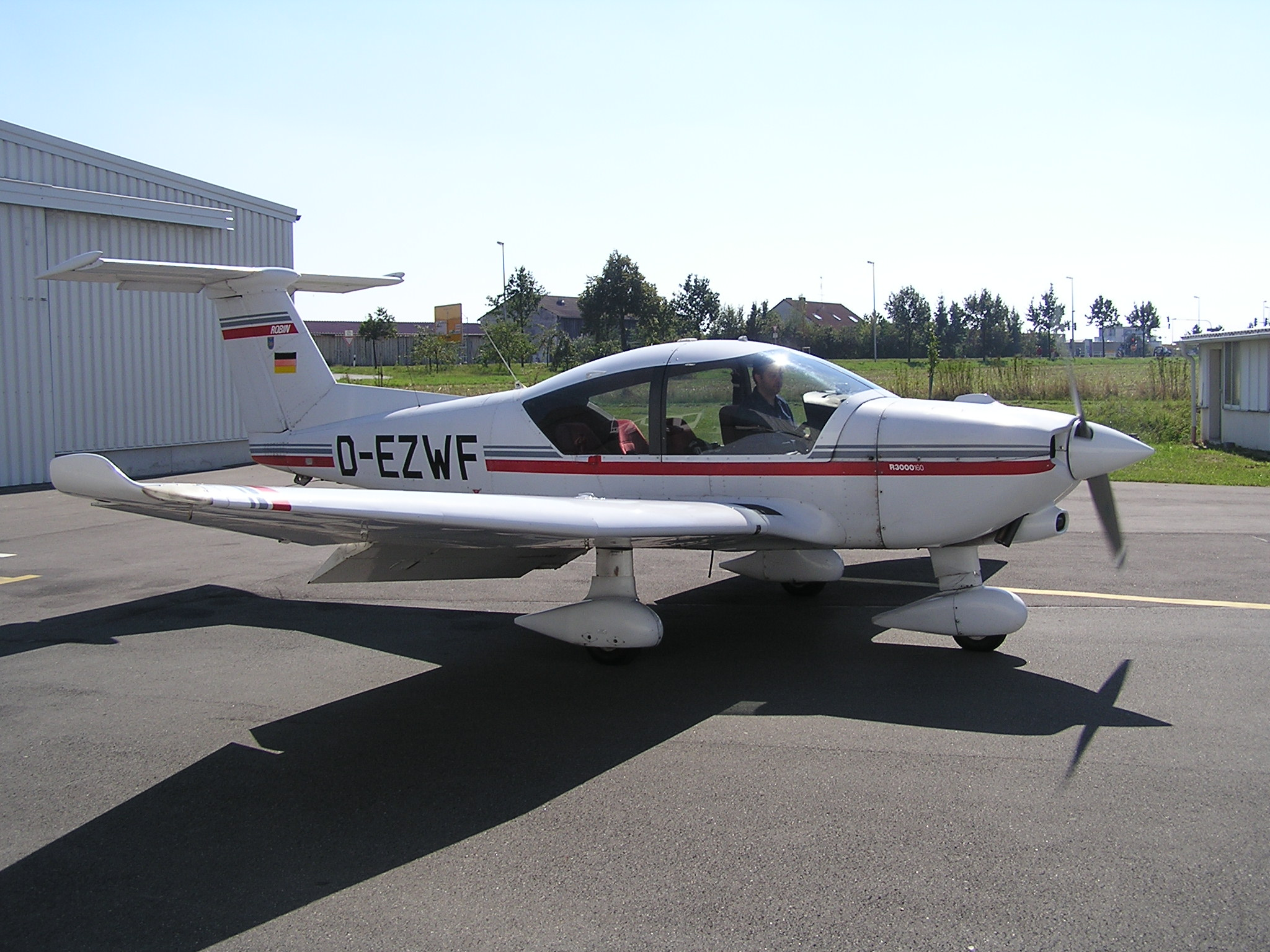 Robin R3000 am Flugplatz Herzogenaurach (EDQH)